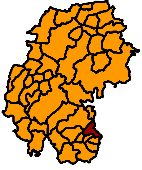 Herschdorf hervorgehoben, Ilm-Kreis